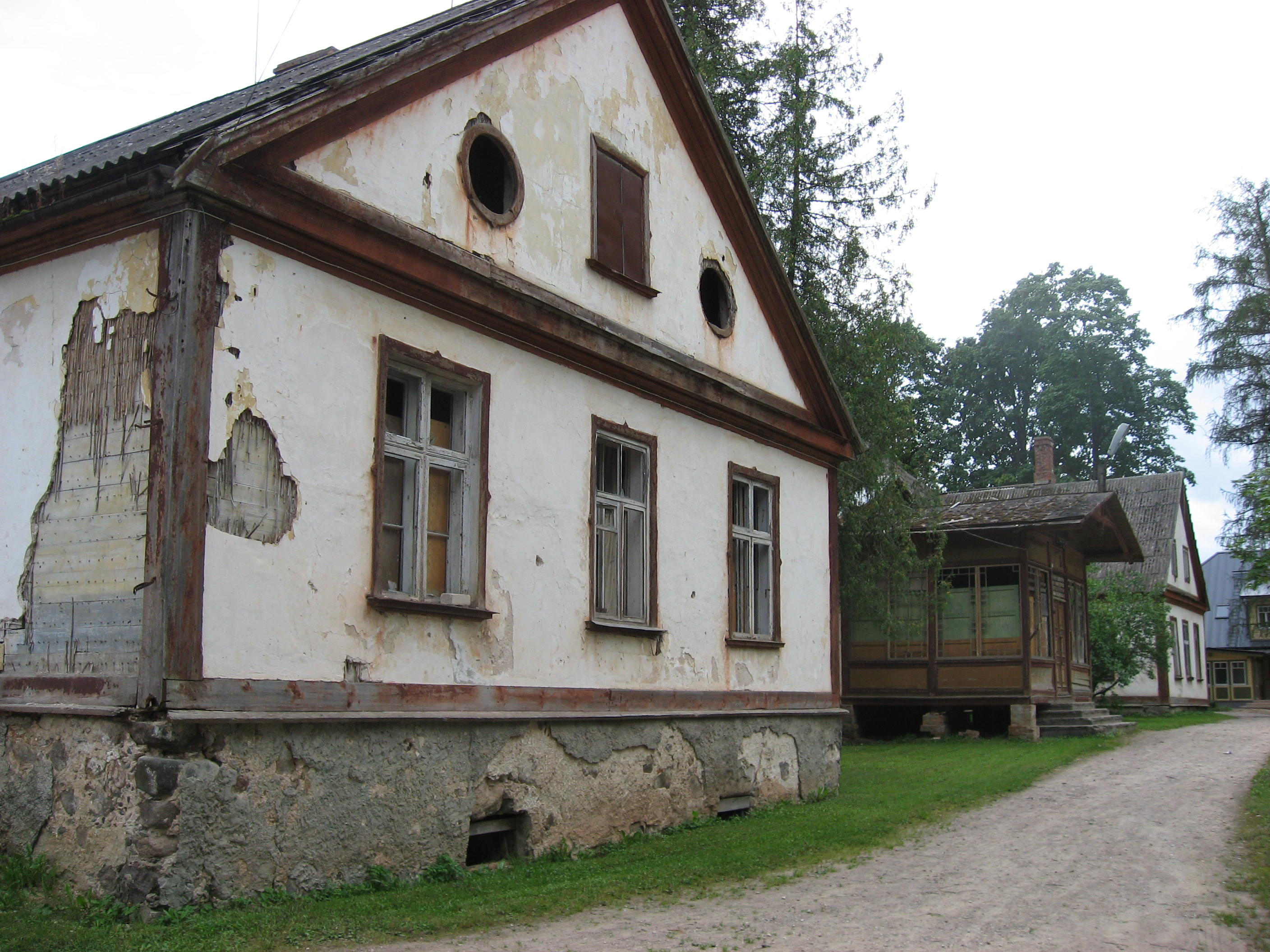 Võro: Tilsi mõisa päähoonõq